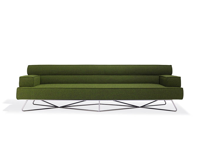 VOW 02